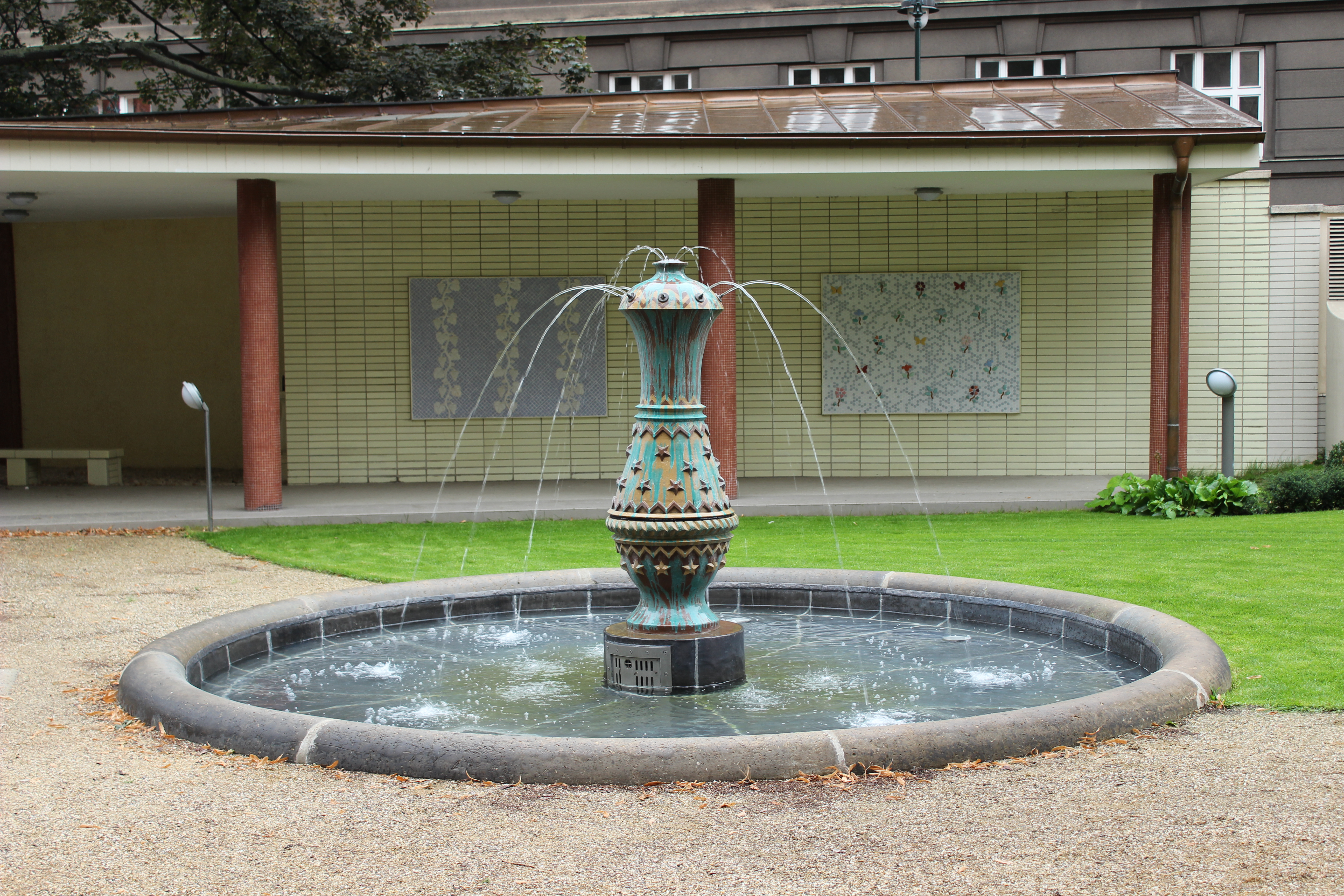 Kašna v pražském Uměleckoprůmyslovém muzeu.